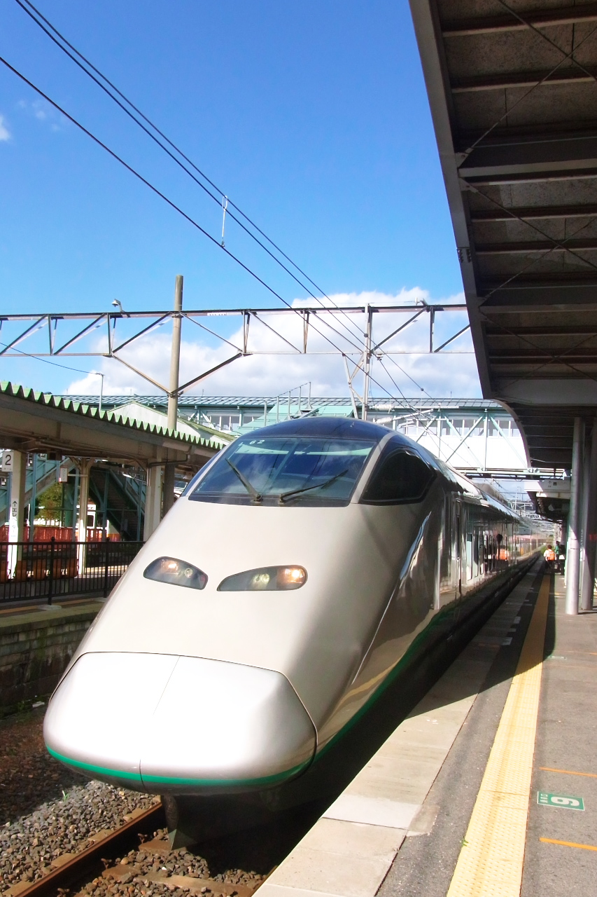 山形新幹線つばさを赤湯駅にて。